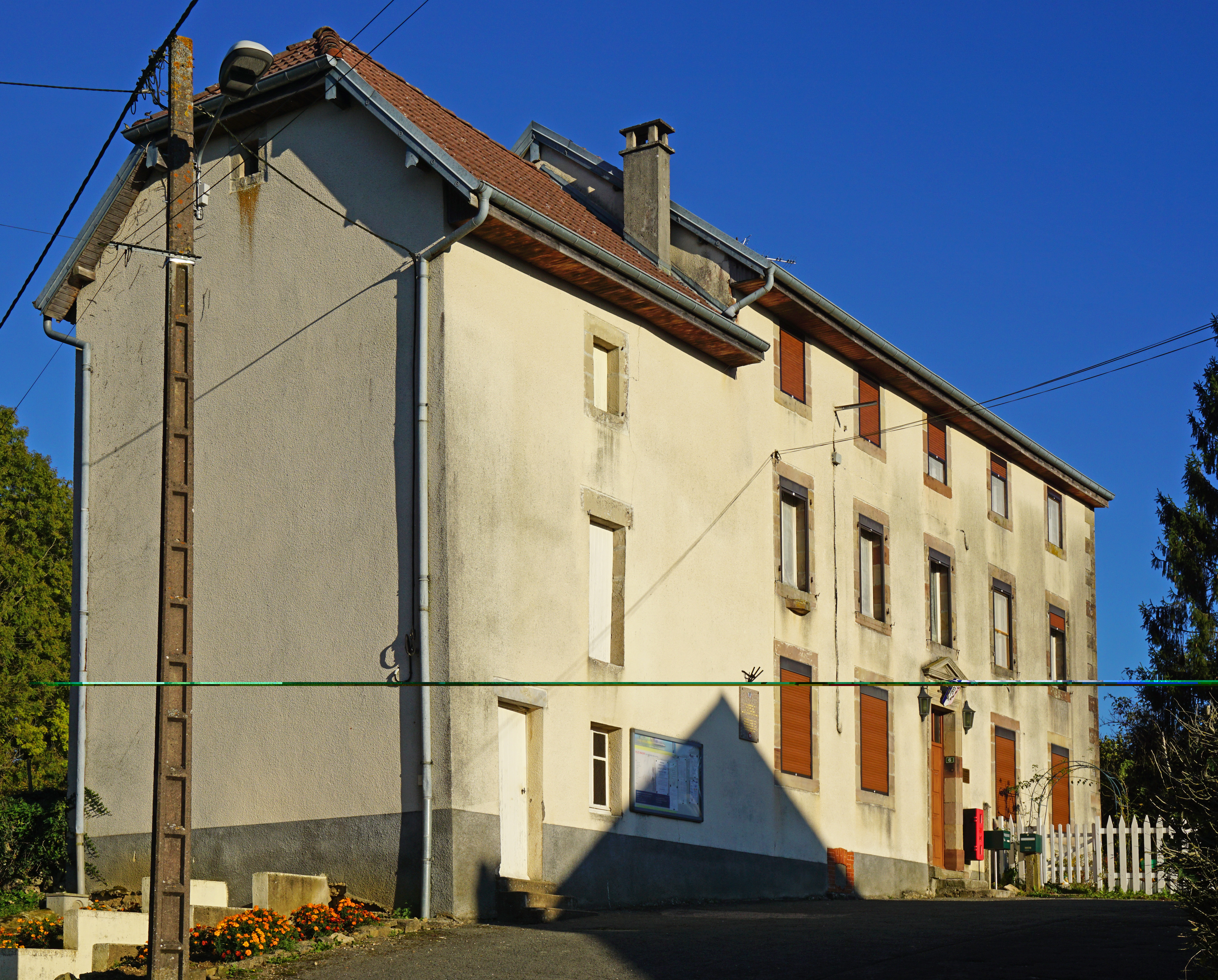 La mairie des Magny.